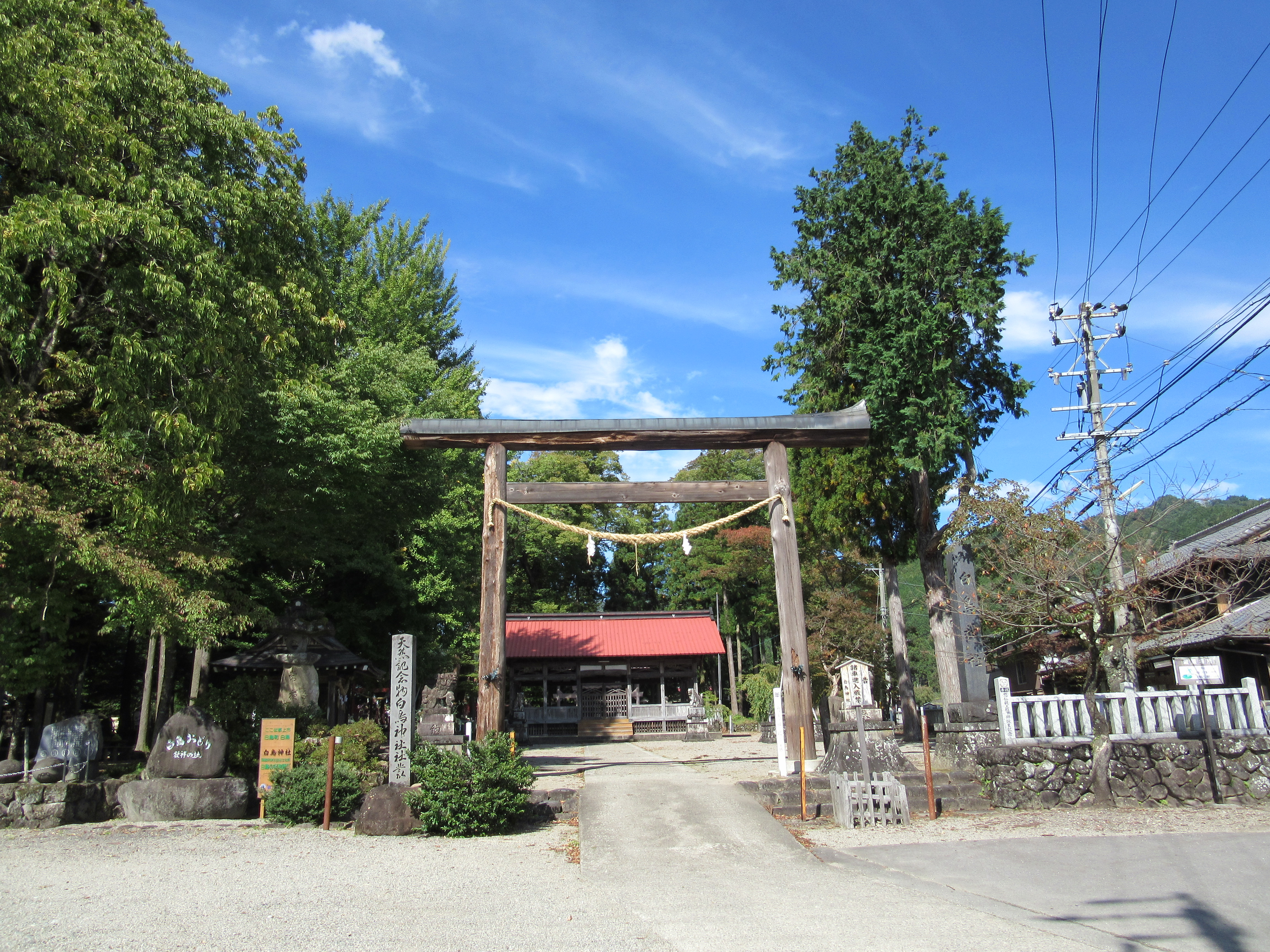 白鳥神社社叢